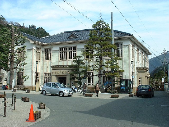 旧八幡町役場